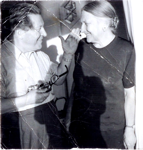 Opname gemaakt in Utrecht ,datum onbekend